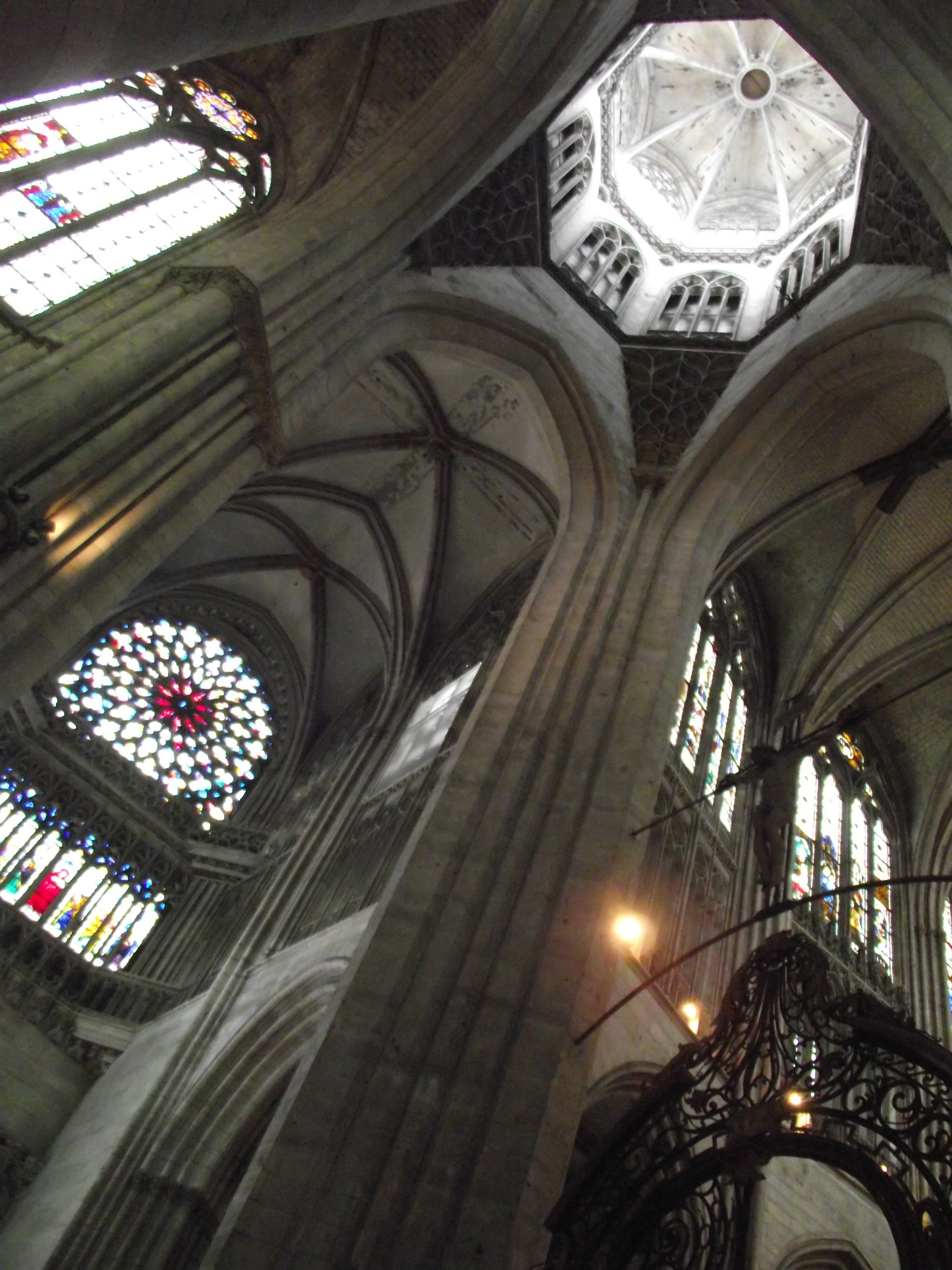 Cathédrale Notre-Dame d'Évreux, XIII-XV siècle